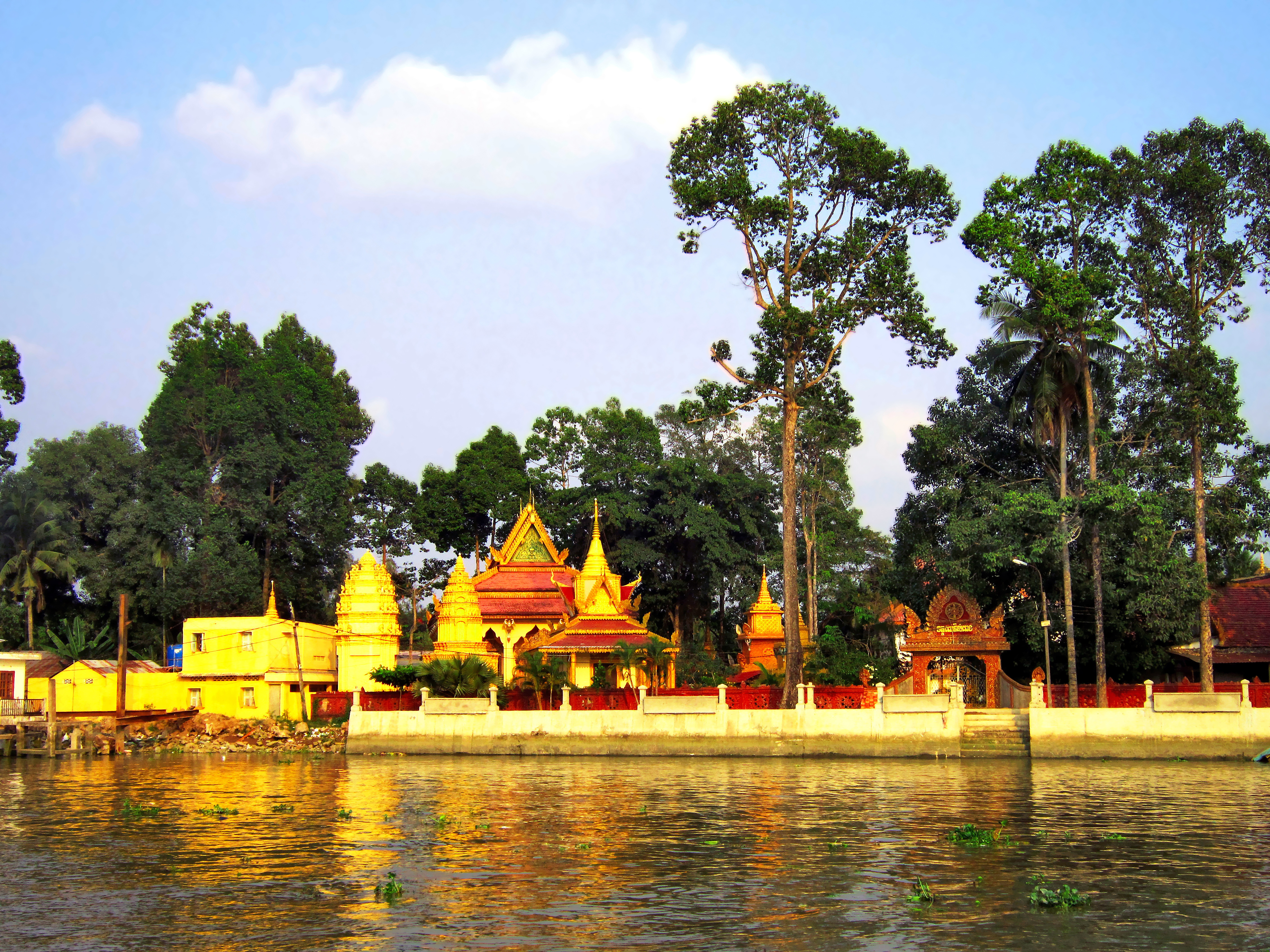 Chùa Pôthi Somrôn là một ngôi chùa cổ của tộc người Khmer ở quận Ô Môn, thuộc TP Cần Thơ, Việt Nam.